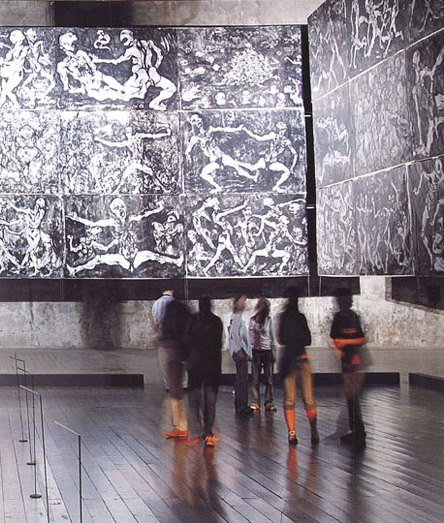 Alcuni visitatori ammirano le opere di Enrico Colombotto Rosso esposte nel Teatro Sociale di Bergamo in occasione della mostra Angeli e Diavoli